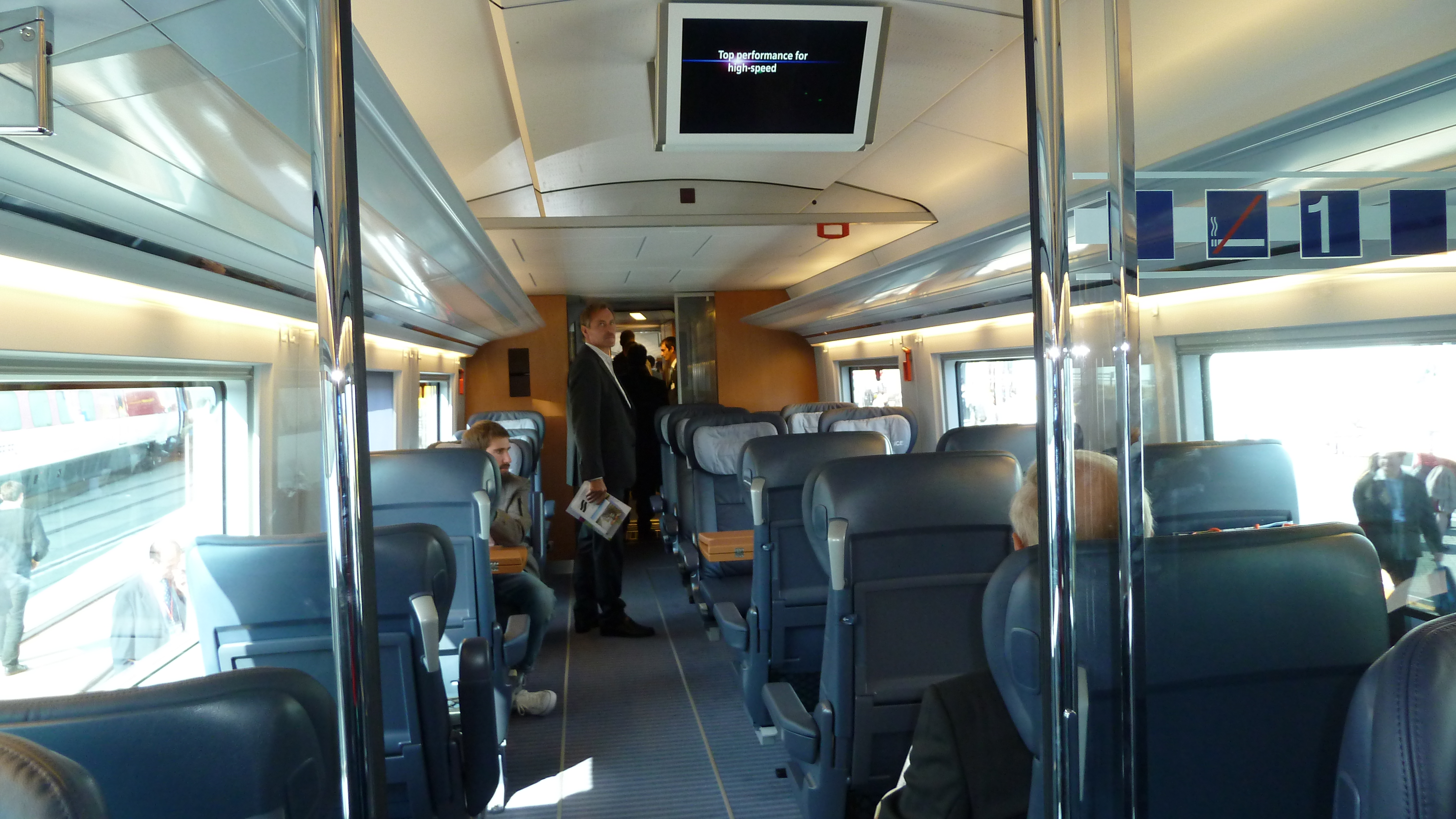 Innenansicht der 1. Klasse eines ICE 3 BR 407 aufgenommen wärend der Präsentation auf der InnoTrans 2010 in Berlin.